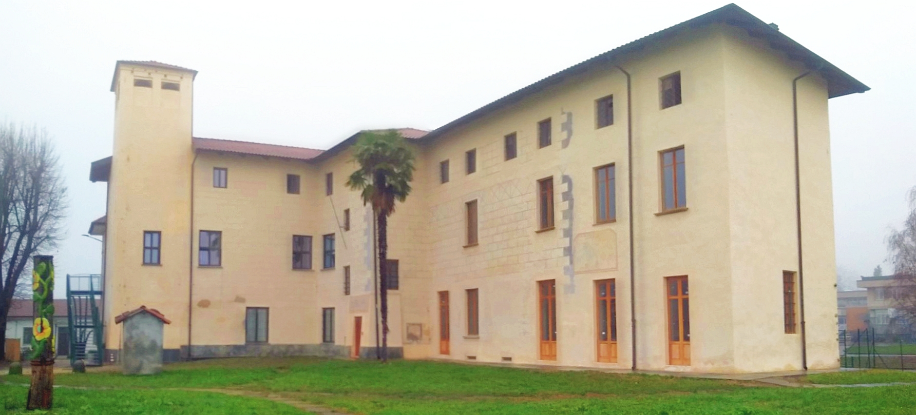 Fiano (TO): il castello degli Arcour